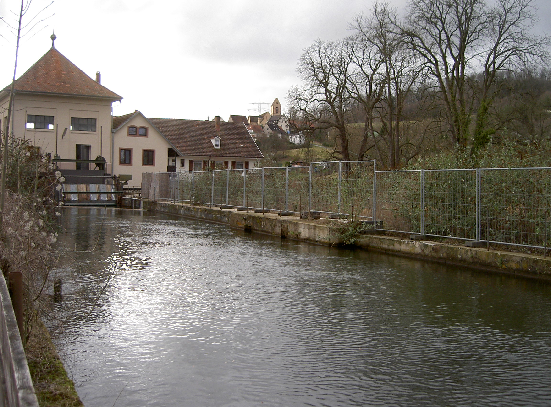 Wasserkraftwerk Rötteln-Haagen